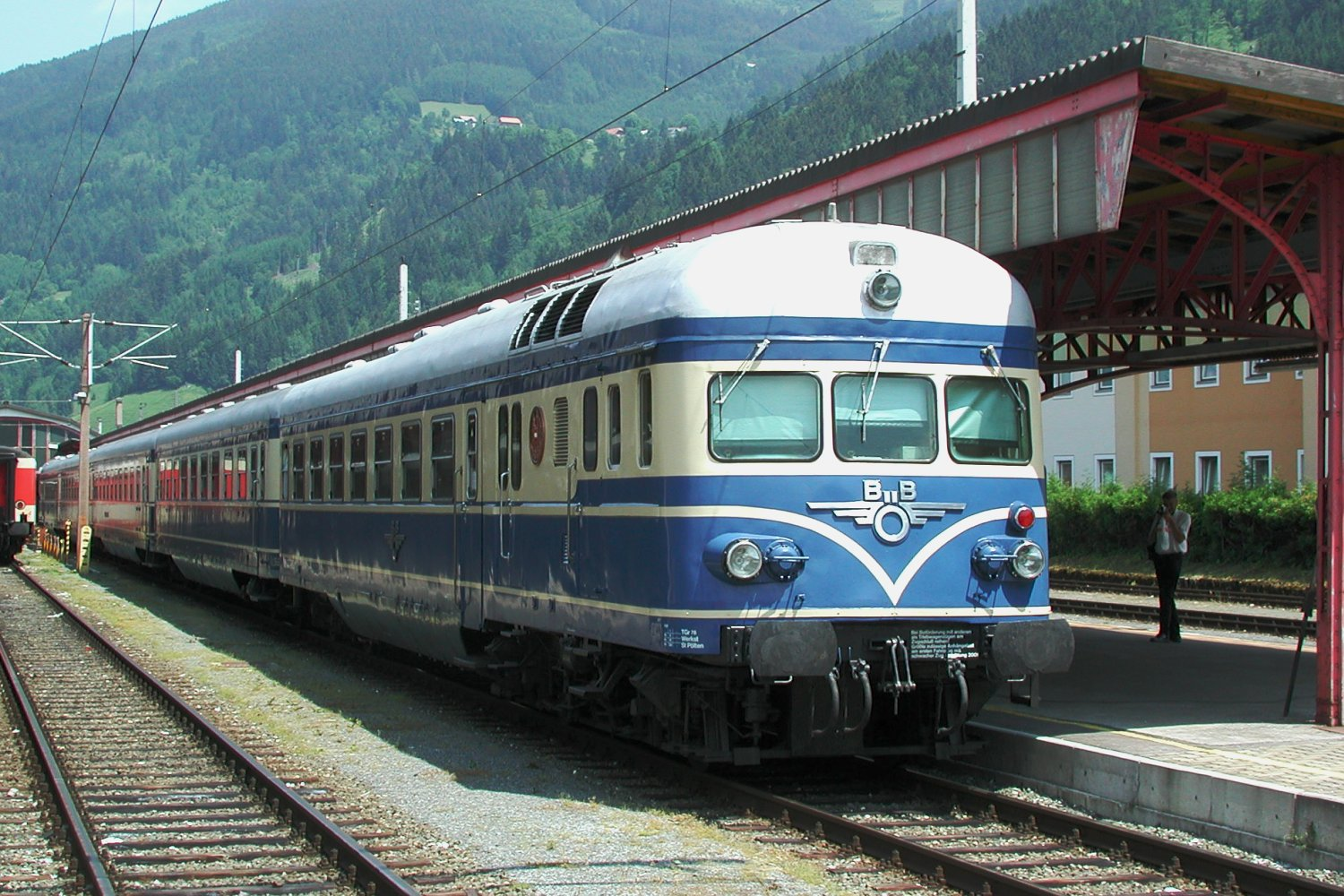 de: Historischer ÖBB Dieseltriebwagen der Reihe 5145 als Sonderzug in Selzthal. en: Historic ÖBB express diesel railcar class 5145 as a special train in Selzthal station.